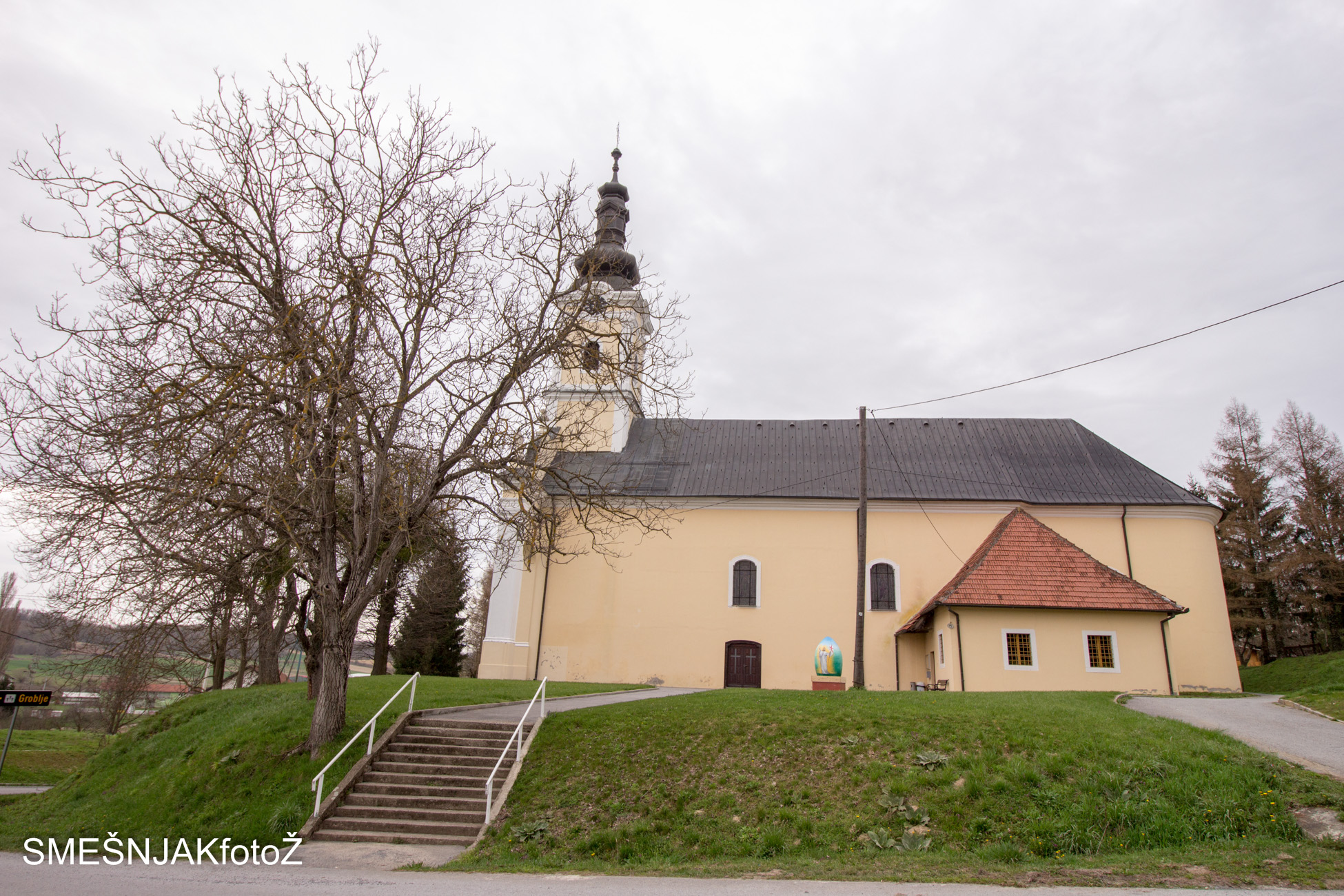 Crkva Presvetog Trojstva